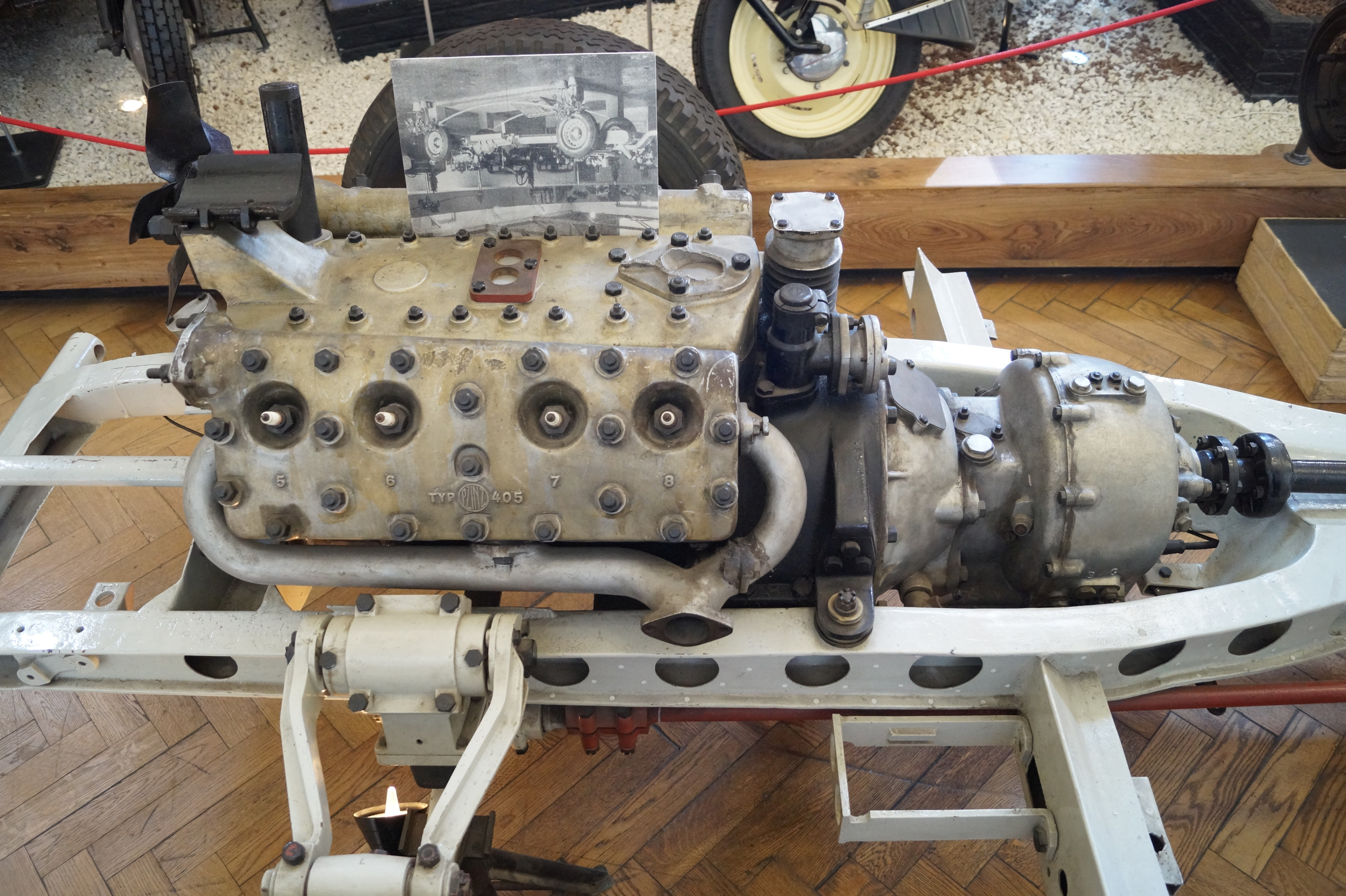 This photo was taken during Automotive Wikiexpedition 2016 set up by Wikimedia Polska Association.You can see all photographs in category Wikiekspedycja motoryzacyjna 2016. English | polski | +/− Silnik i skrzynia biegów auta PzInż 403 Lux-Sport w Muzeum Nauki i Techniki w Warszawie